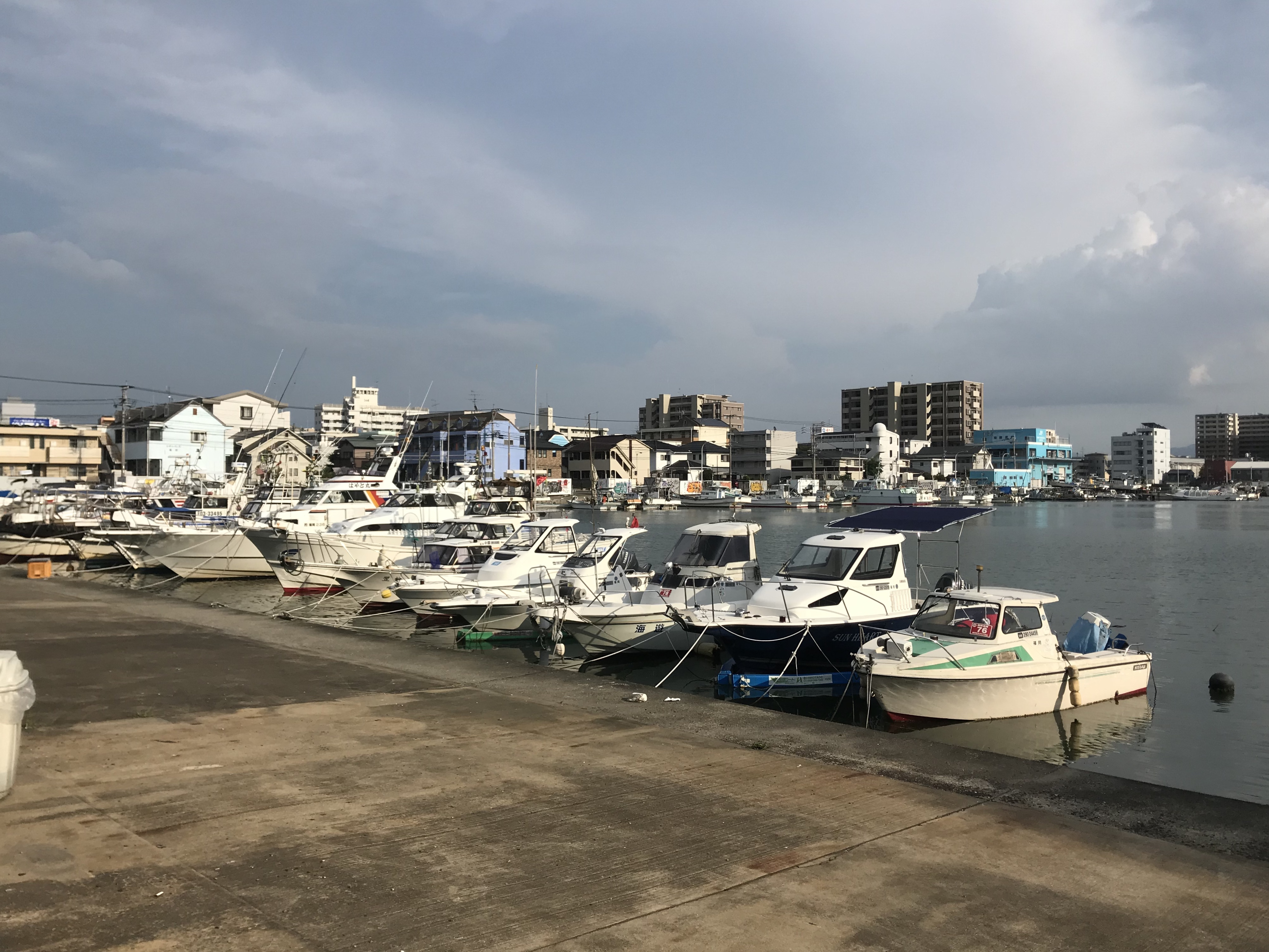 箱崎漁港の様子